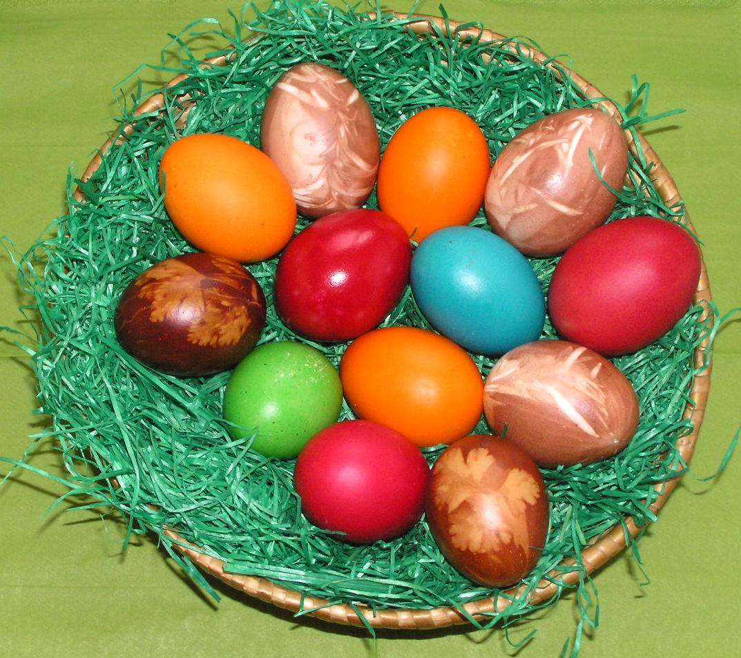 Ostereier (5x) im Sud mit Außenschalen roter Zwiebeln in „Negativtechnik“ mit „Blattabdrücken“ verziert und acht Eier mit Eierfarbe gefärbt.